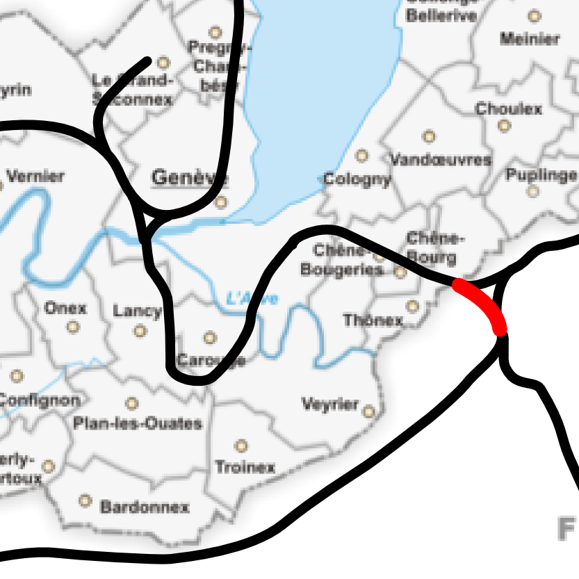 Proposition d'embranchement au CEVA à Ambilly, France